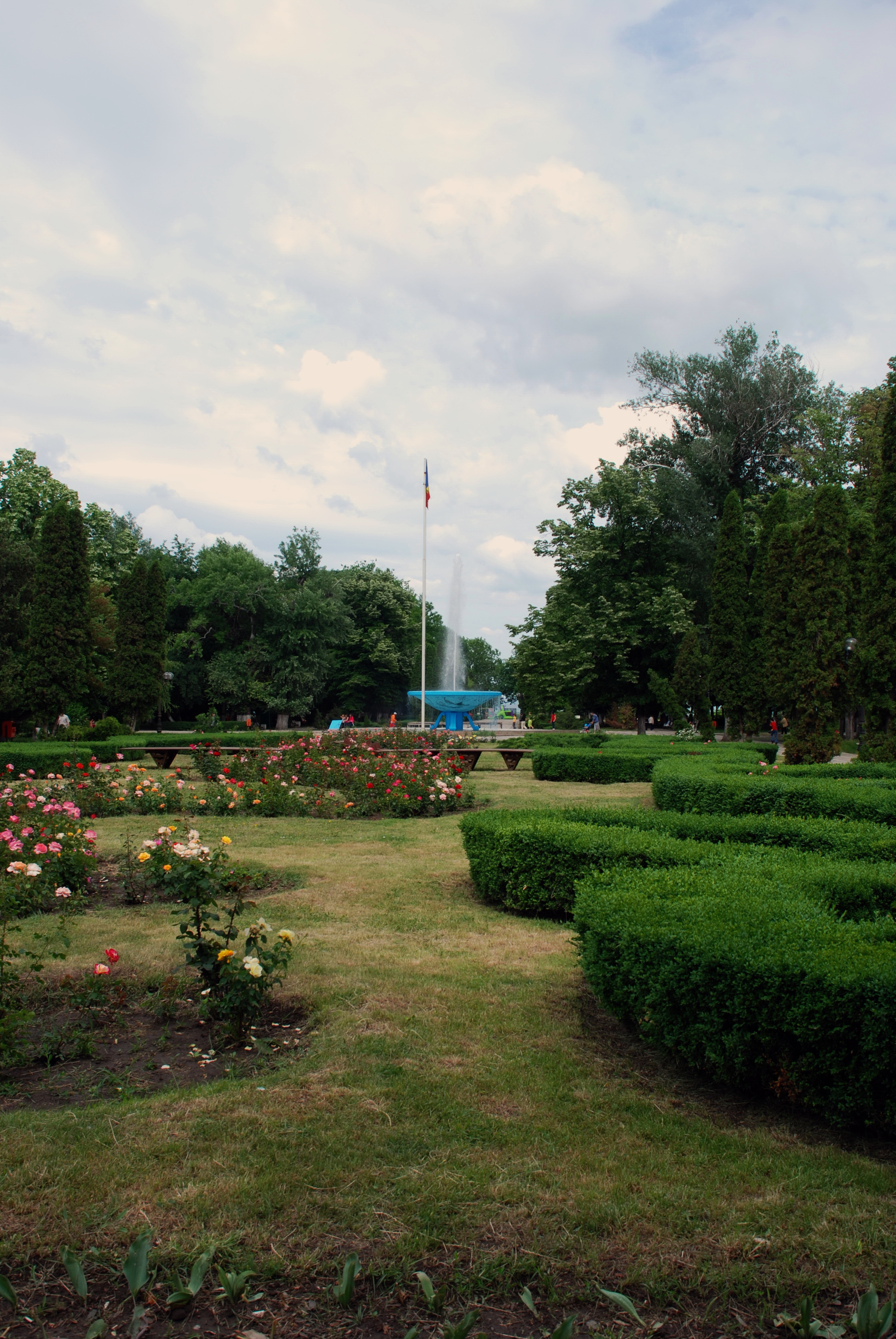 Fantana Arteziana construita in 1964, se gaseste in centrul acestei locatii si este punctul de atractie al gradinii.